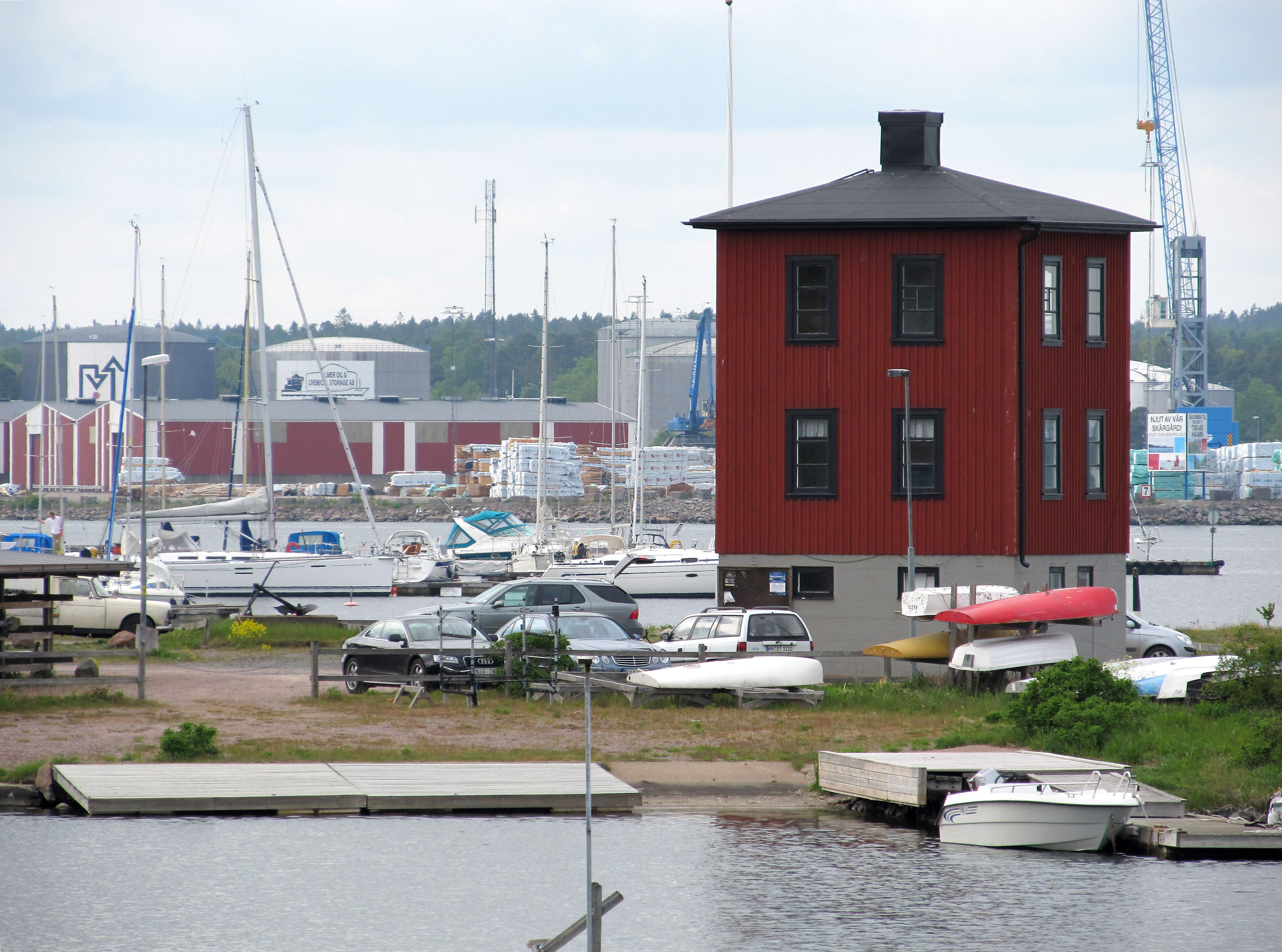 Ernemar småbåtshamn, Oskarshamn, Sverige.